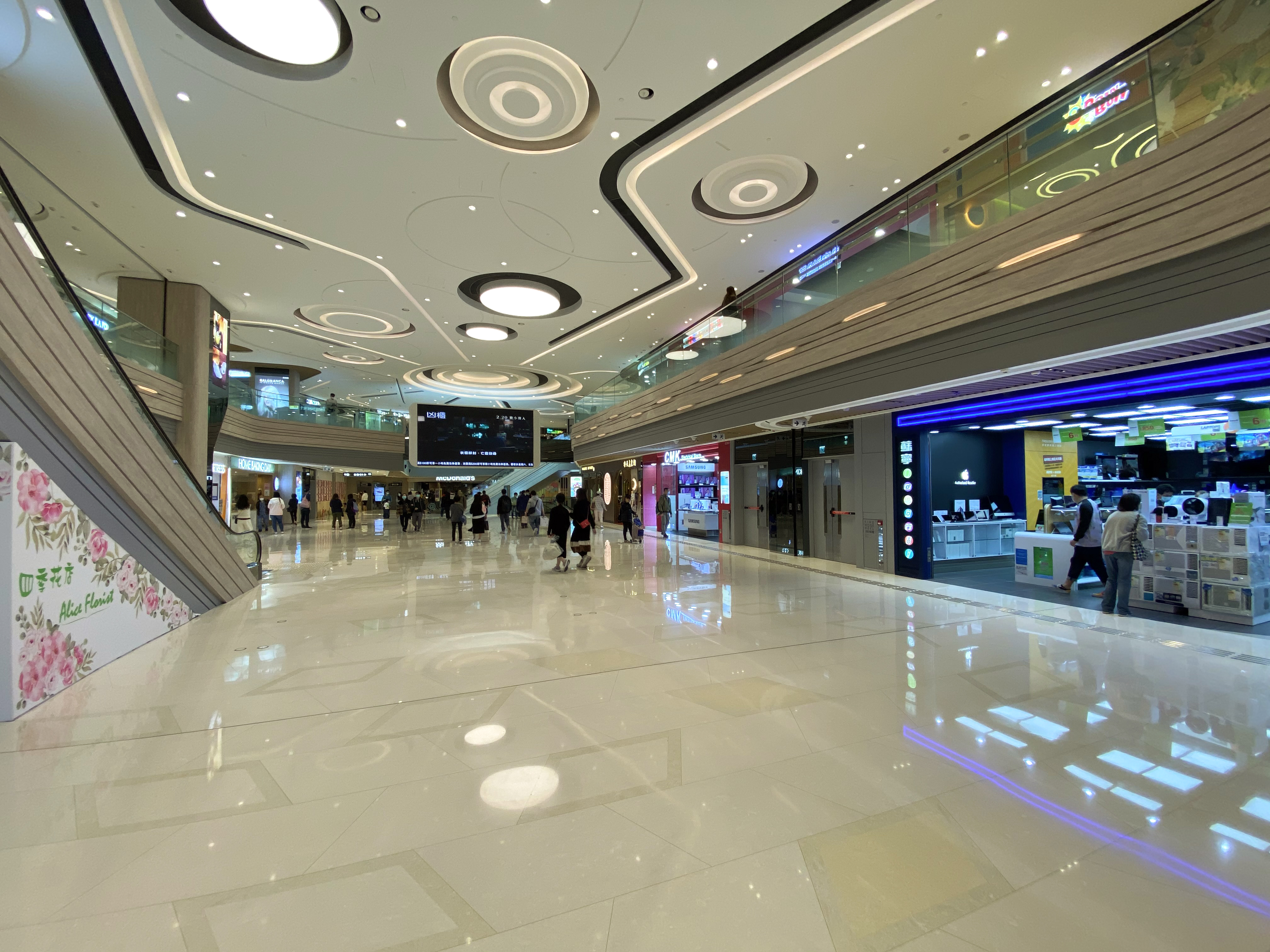 Park Central void